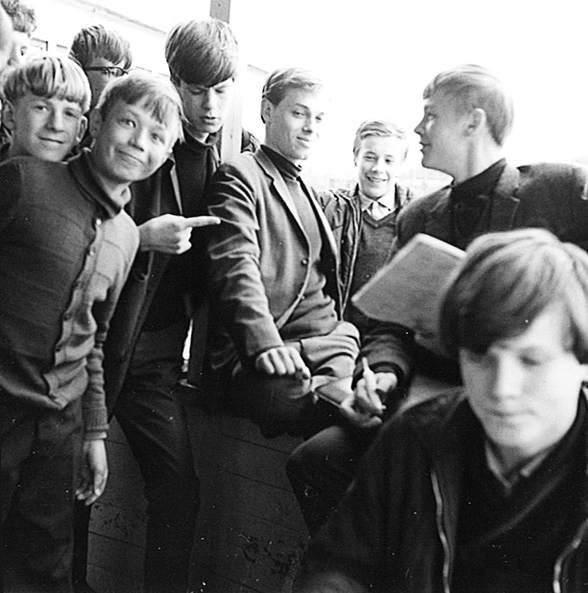 Kuvaamataidonopettaja Teemu Luoto (1941–) oppilaineen.